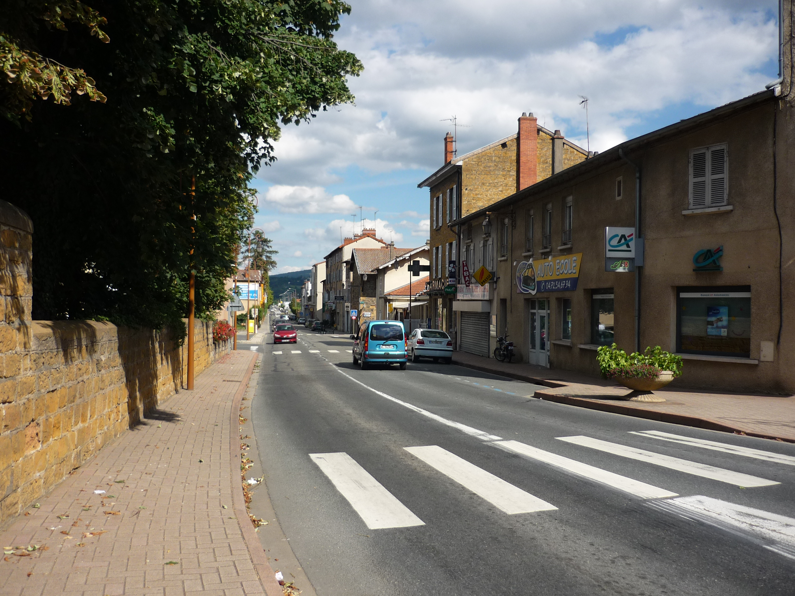 Vue de la route départementale 385 à Lozanne, dans le département du Rhône.